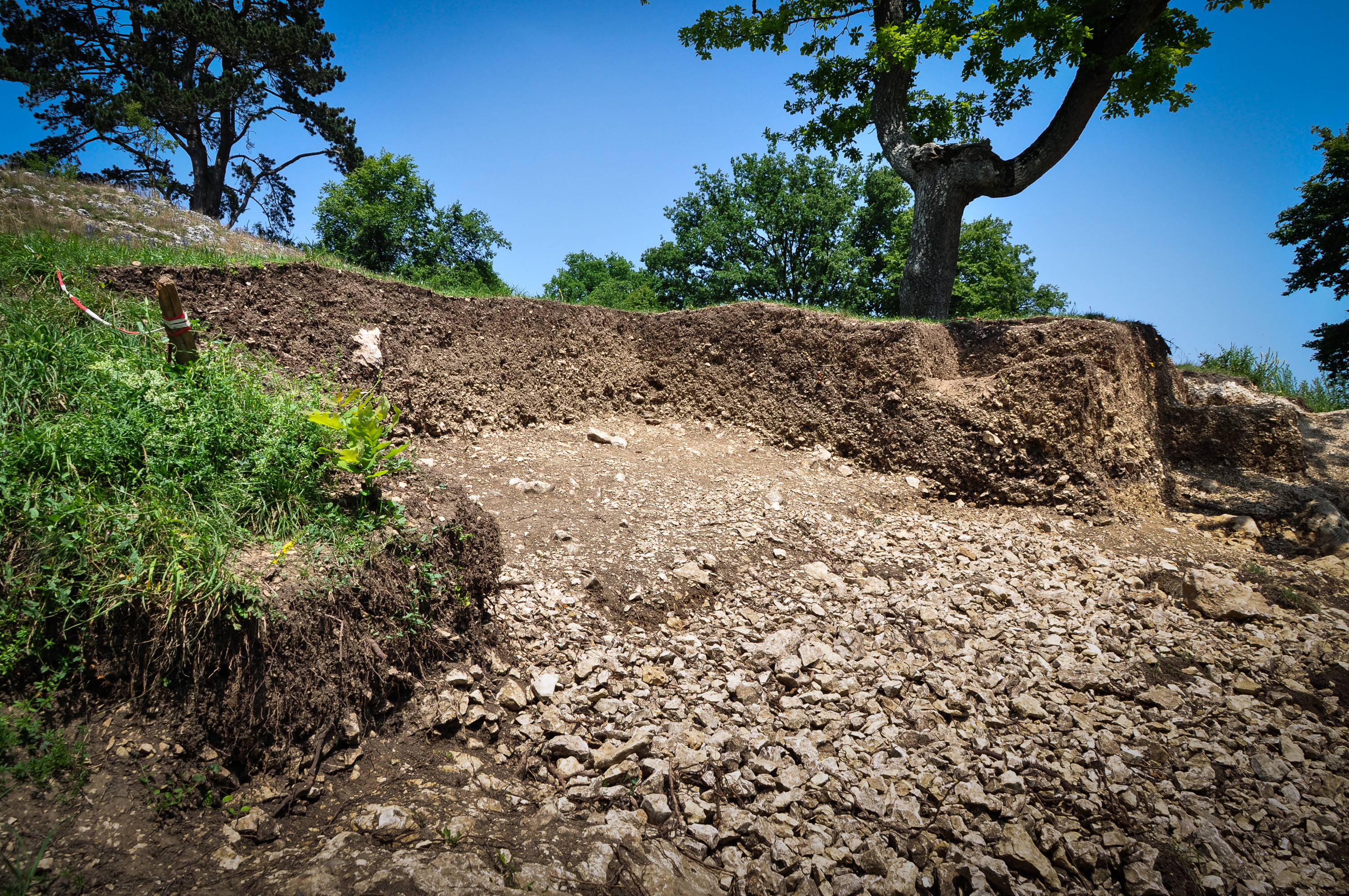 Vogelherdhöhle 2012: Nachgrabungen im Abraum der Ausgrabungen von Gustav Riek, 1931.